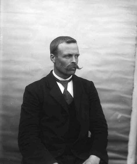 Olav Olavson Bjaaland, norsk langrennsløper og polarutforsker